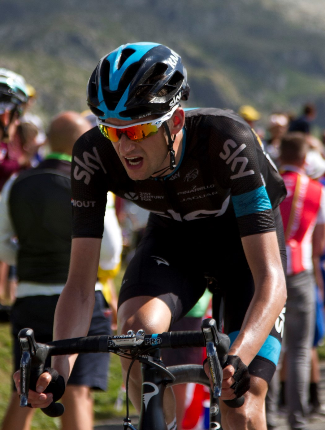 073 wout poels